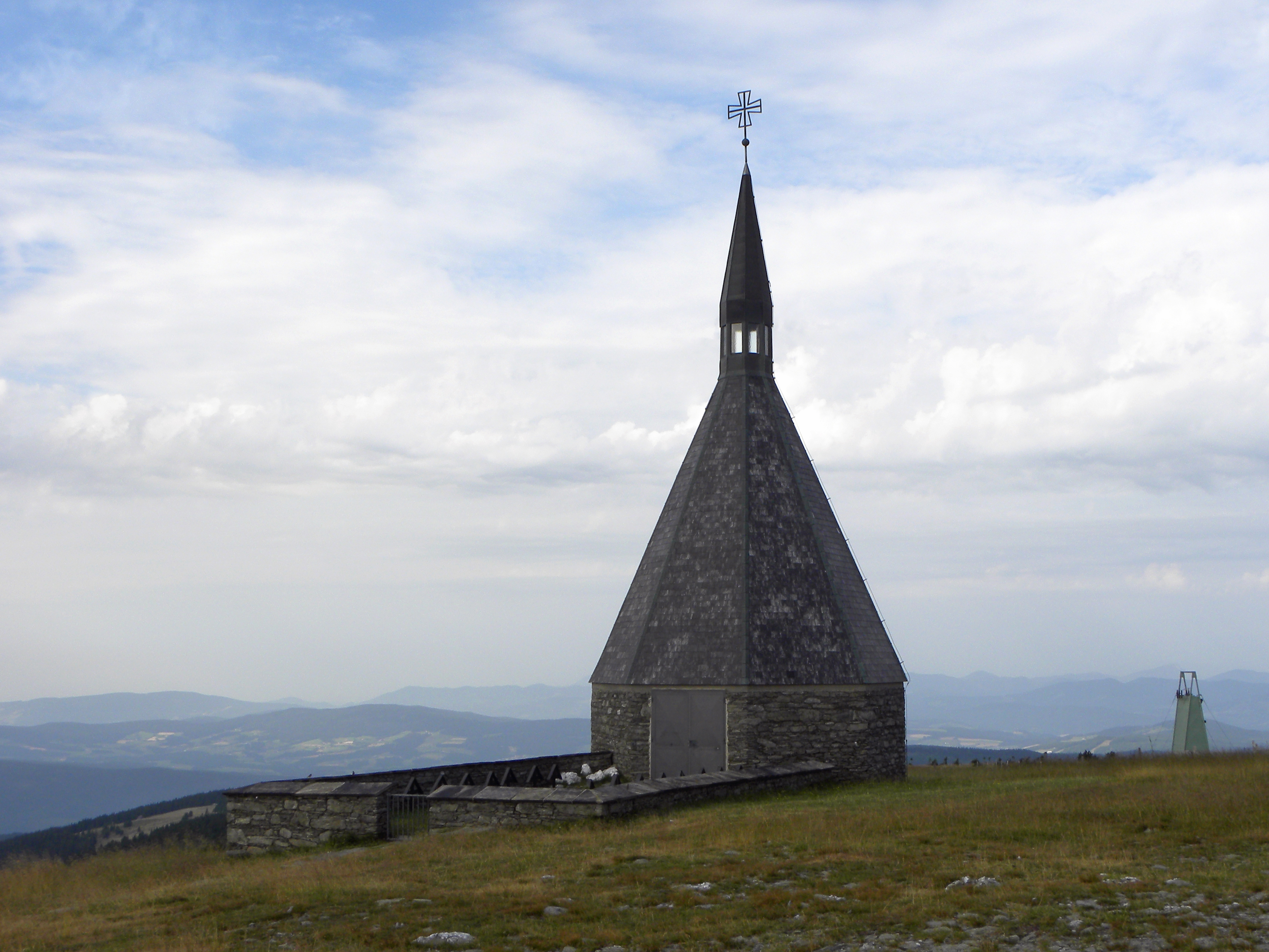 Wanderung von Mönichkirchen über den Hochwechsel nach Mariensee